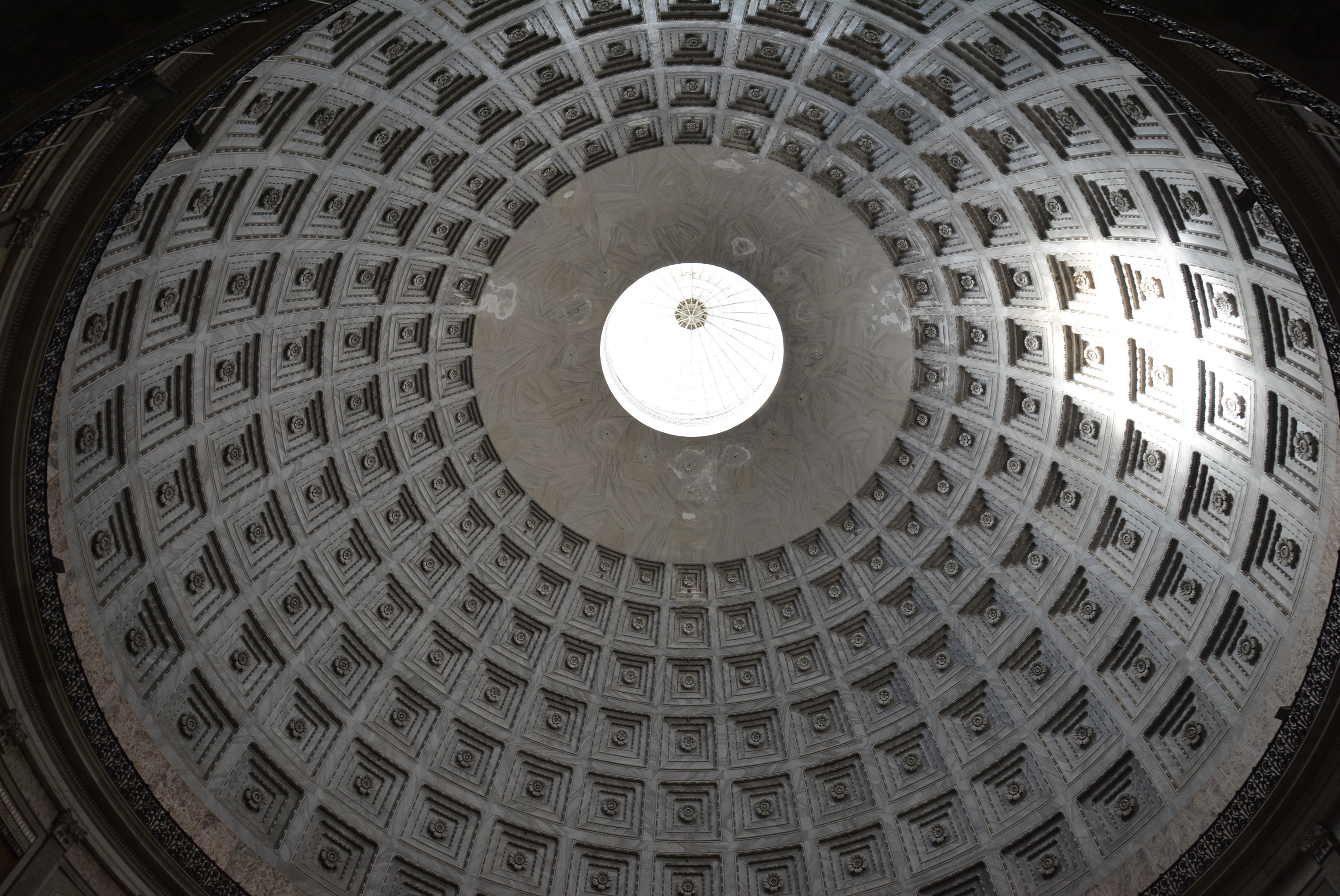 Basilica reale pontificia di San Francesco di Paola a Napoli